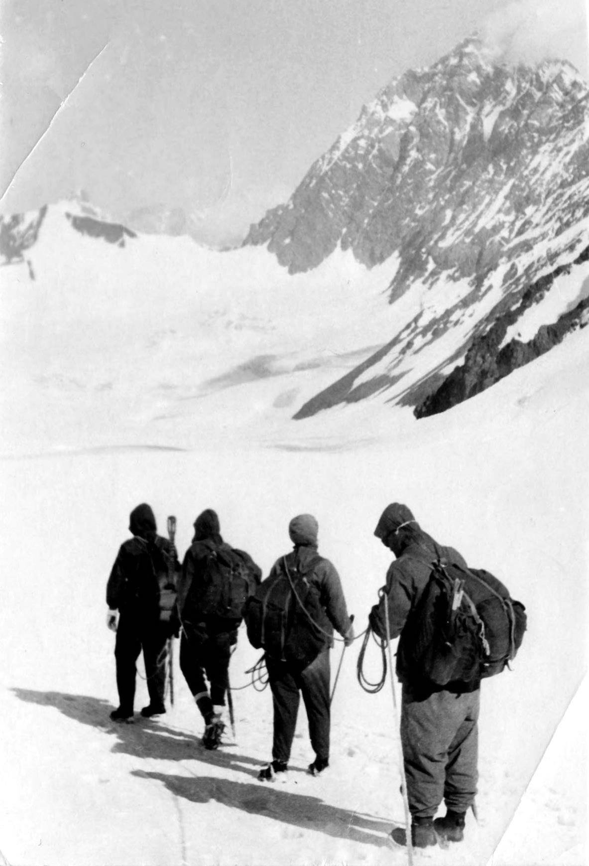 Шлях від перевалу Верхній Цанер до перевалу Сімох (Кавказ)